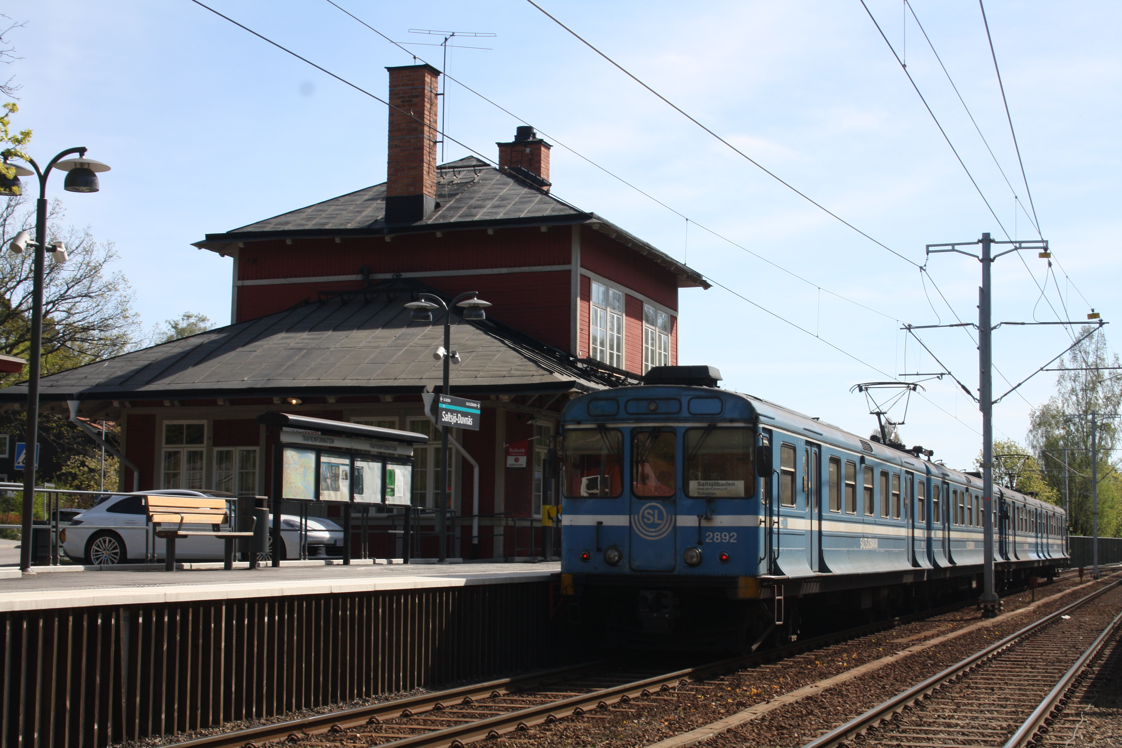 Saltsjö-Duvnäs